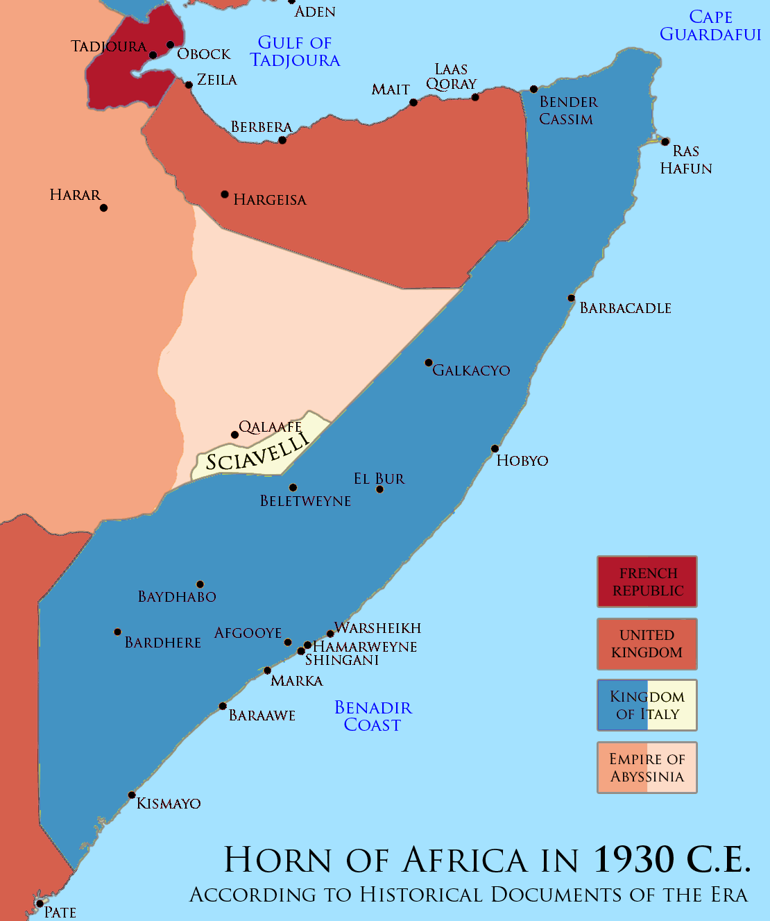 Somali lands in 1930